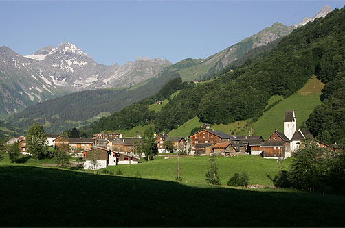 Elm mit Blick zum Hausstock